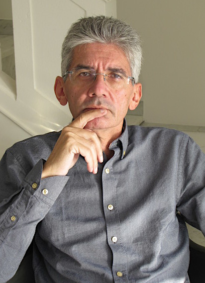 Portrait de Franck Biancheri